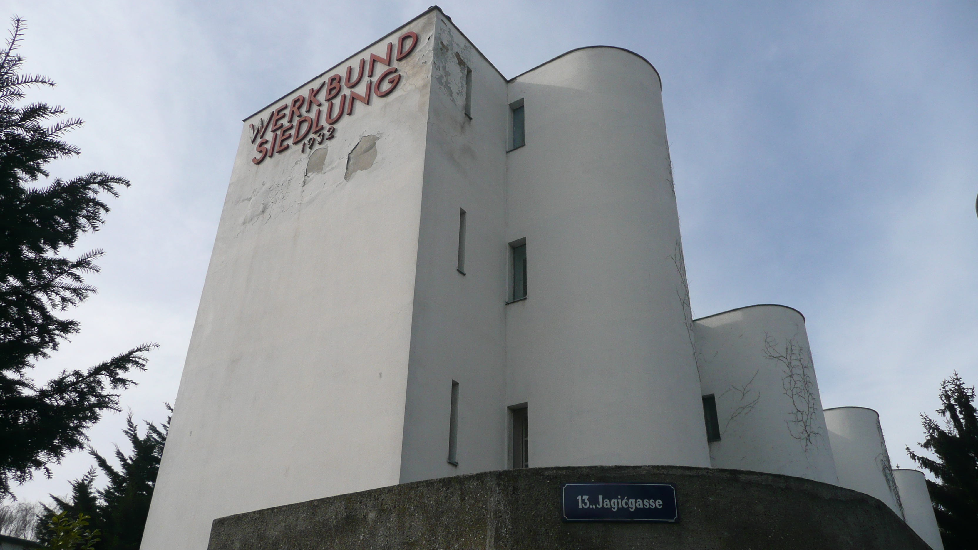 Werkbundsiedlung Wien, Veitingergasse 87-93